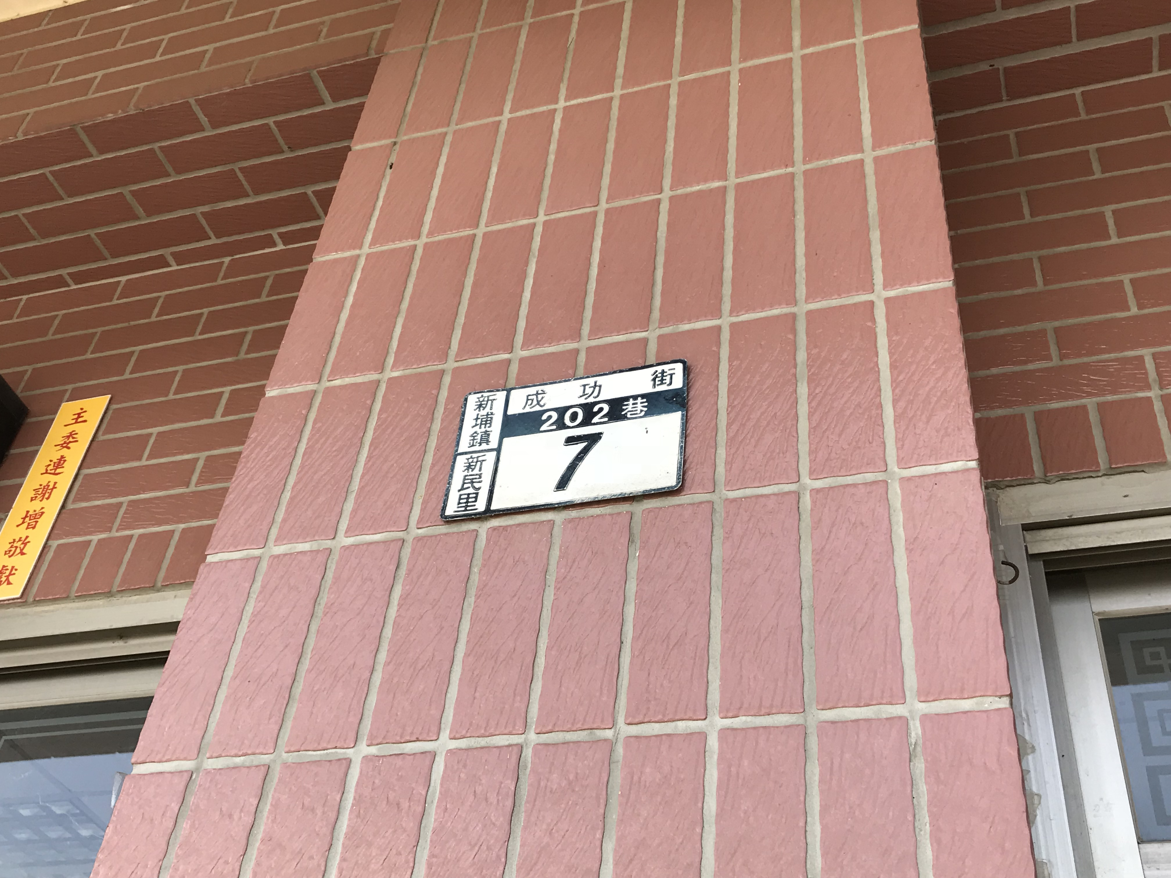 中文（台灣）: 新埔文昌祠門牌